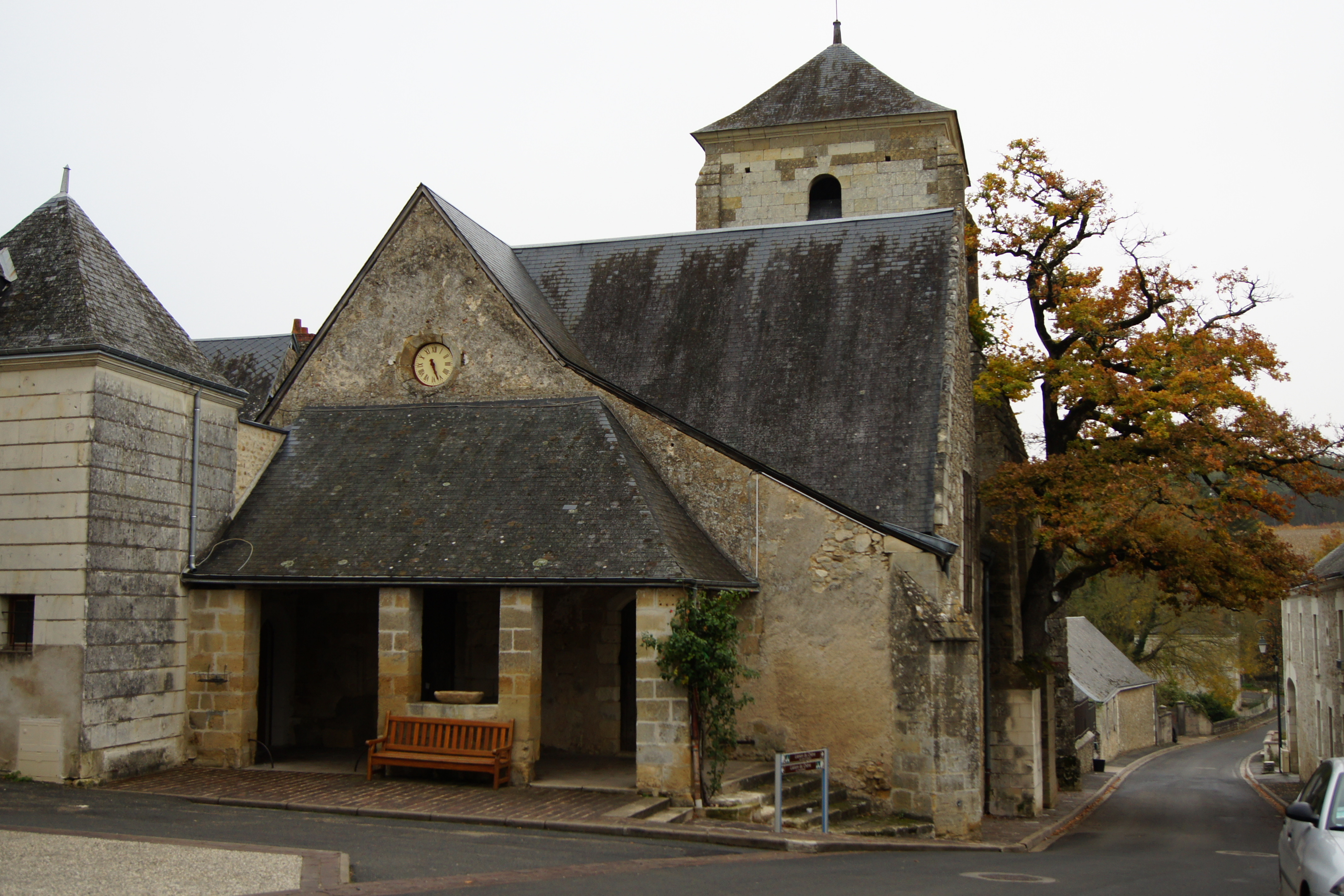 Cheillé le bourg : l'église St Didier et le chêne qui pousse dans le mur.